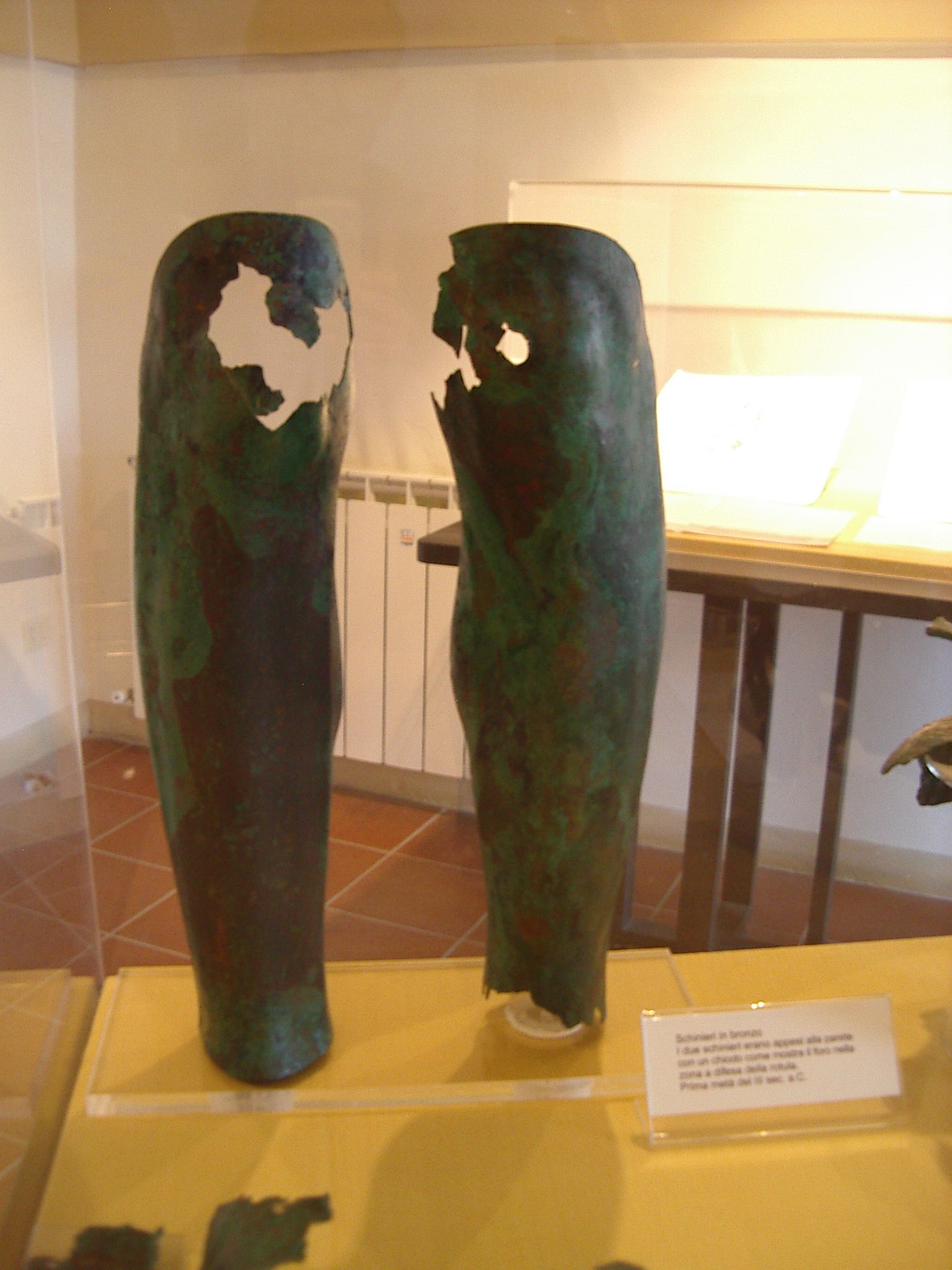 Antiquarium de la nécropole du Palazzone, Cnémides ou jambières de type anatomique en bronze laminé